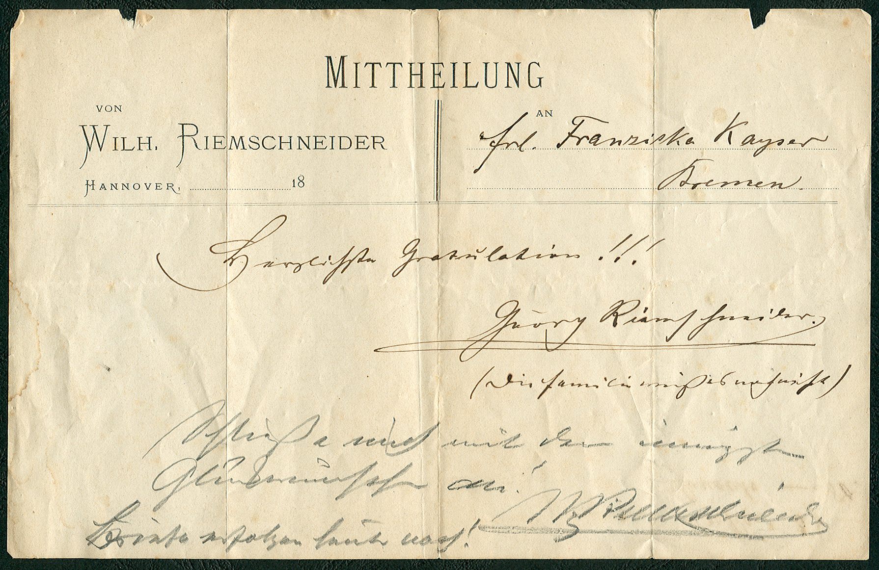 Vordruck einer "Mitteilung" der 1856 gegründeten Buchdruckerei "Wilh. Riemschneider", die anfangs für den Druck der Zeitung für Norddeutschland beauftragt wurde. Die "Herlichste Gratulation" an Fräulein Franziska Kayser aus der Familie des Kammersängers und späteren Intendanten der Göttinger Oper, Paul Stiegler, wurde hier unter anderem von Georg Riemschneider (und möglicherweise von dem Firmengründer Wilhelm Riemschneider ?) unterzeichnet.